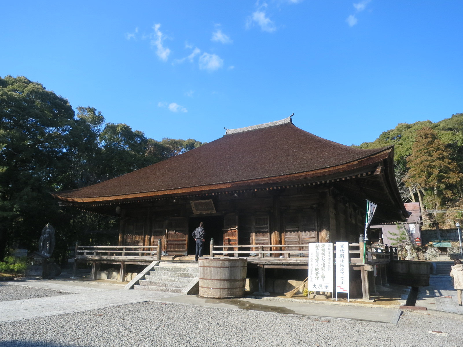 滝山寺（岡崎市滝町）